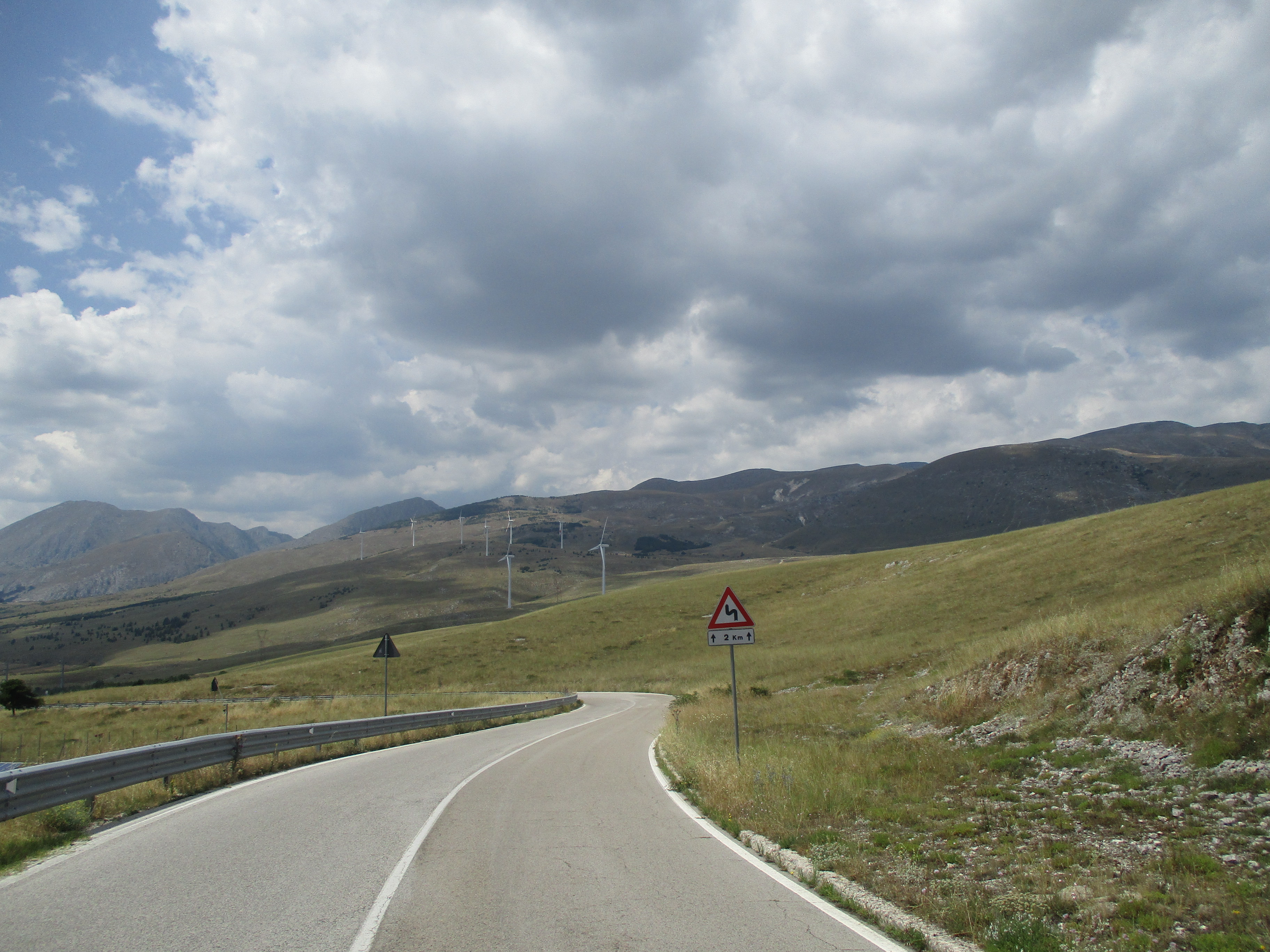 Il profilo della bella addormentata visto da Forca Caruso